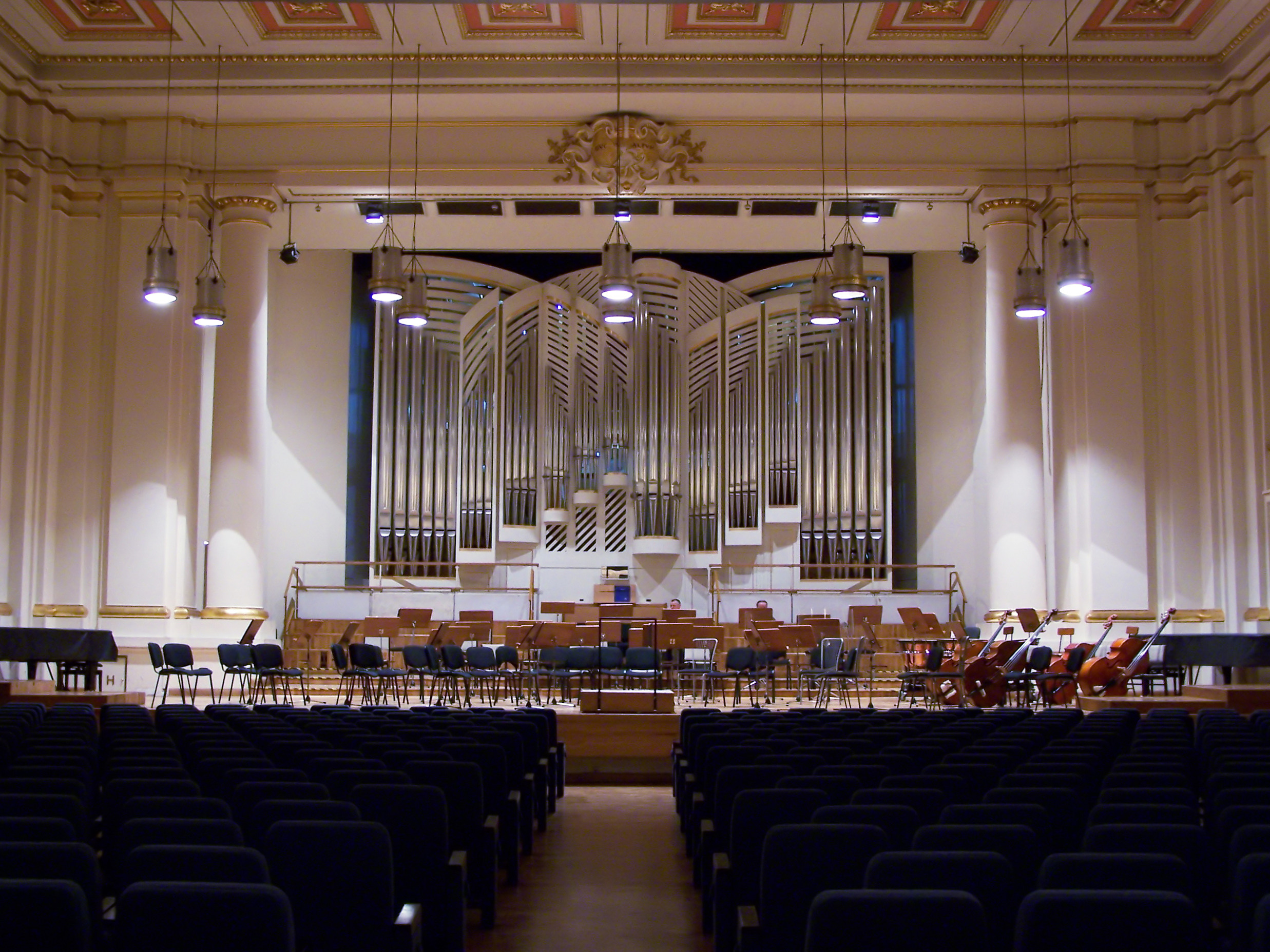 Sala koncertowa filharmonii w Krakowie.